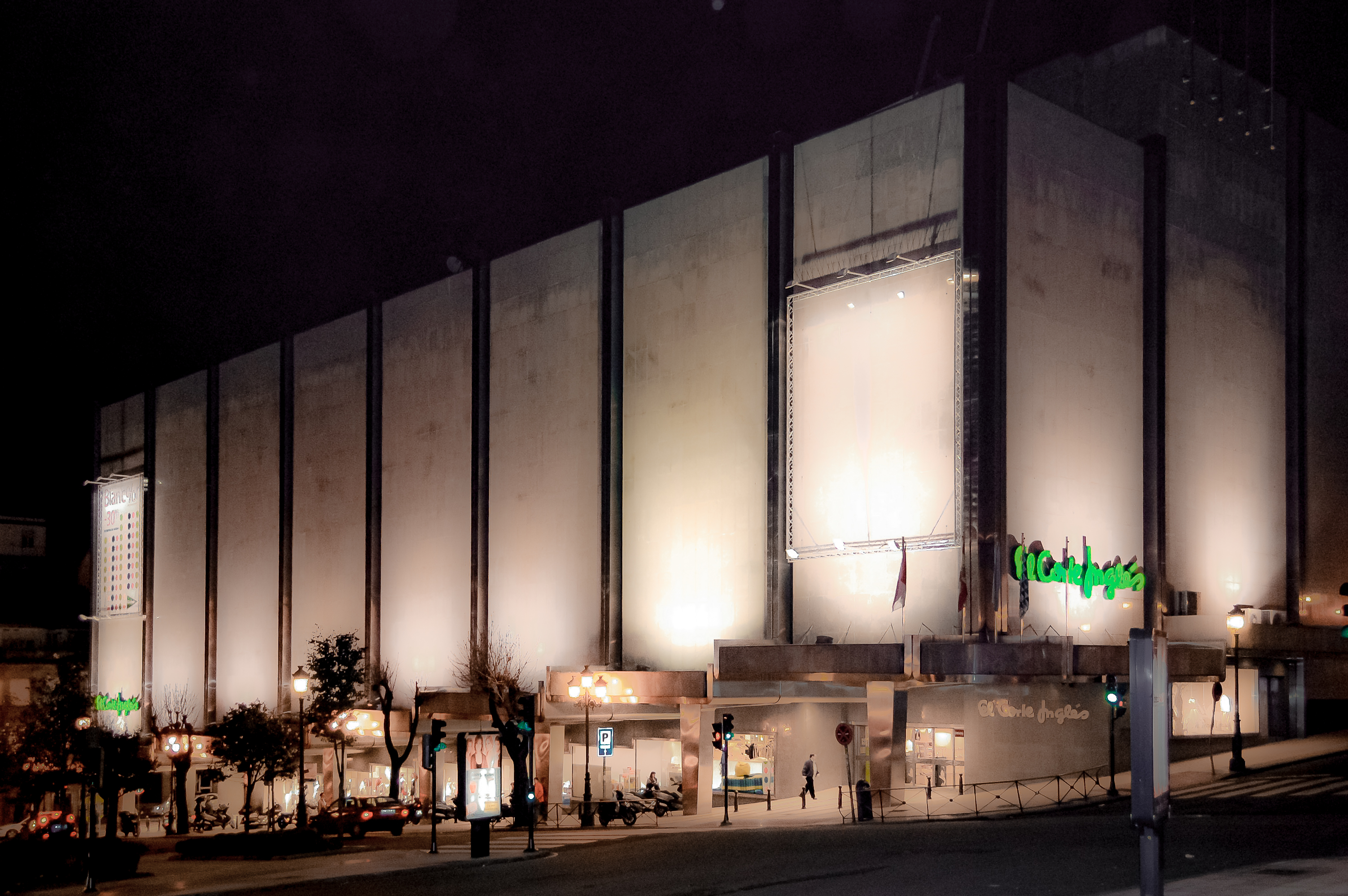 Loja da cadeia El Corte Inglés em Vigo.